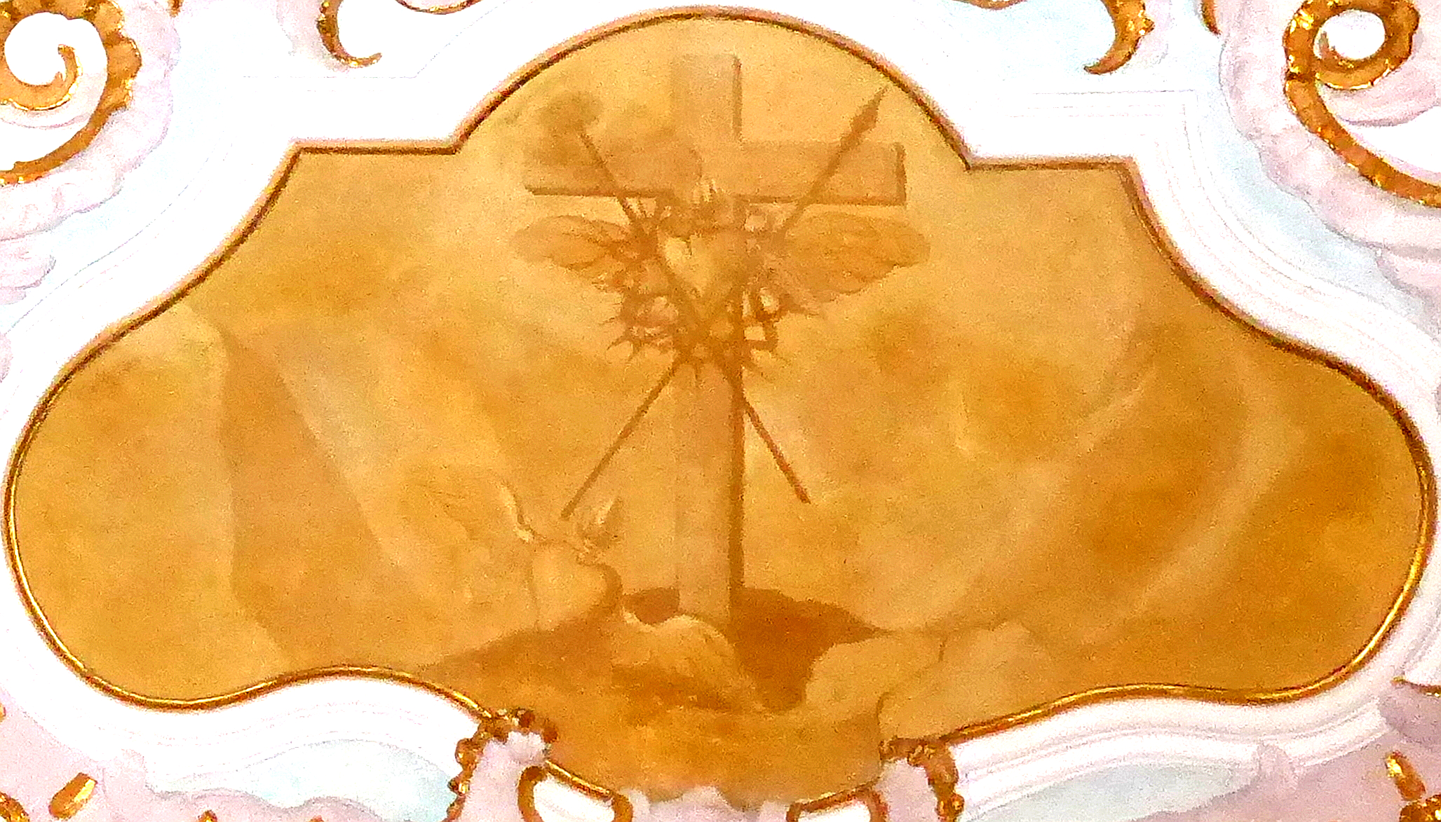 Deckengemälde in der Wallfahrtskirche Heilig Kreuz in Mindelaltheim